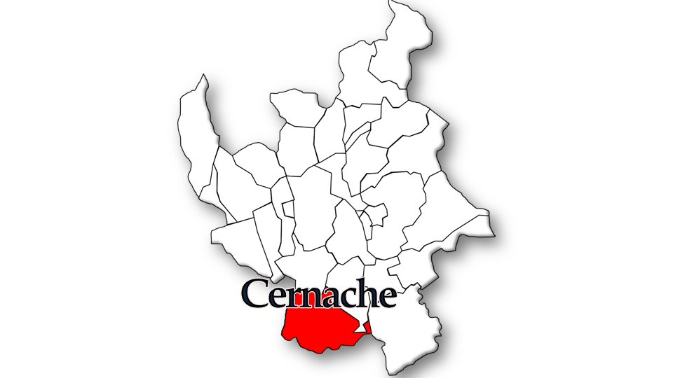 População